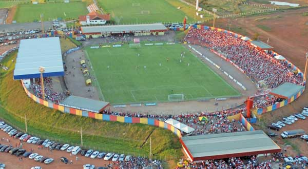 Luterão